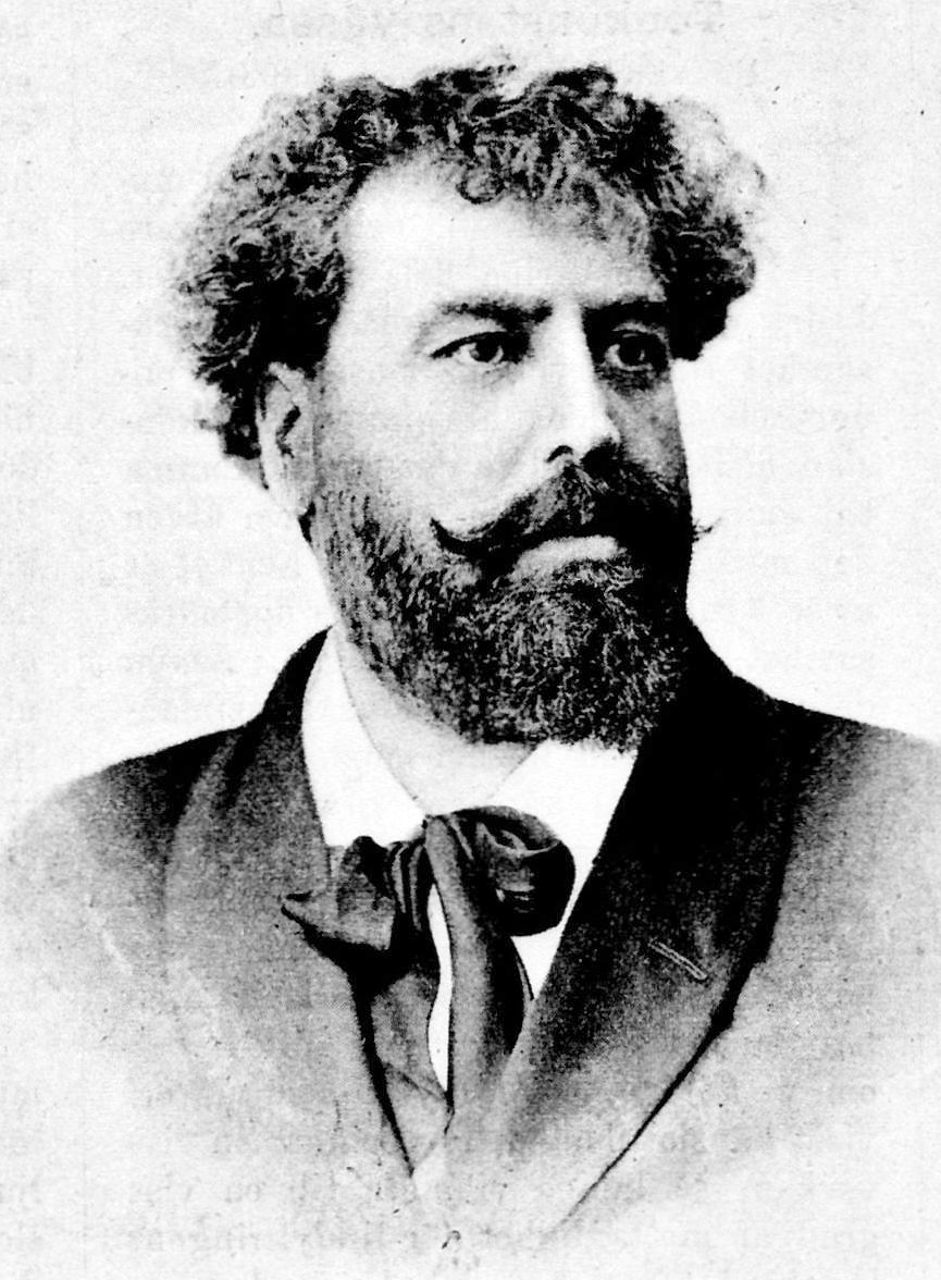 Adalbert von Goldschmidt (1848-1906)